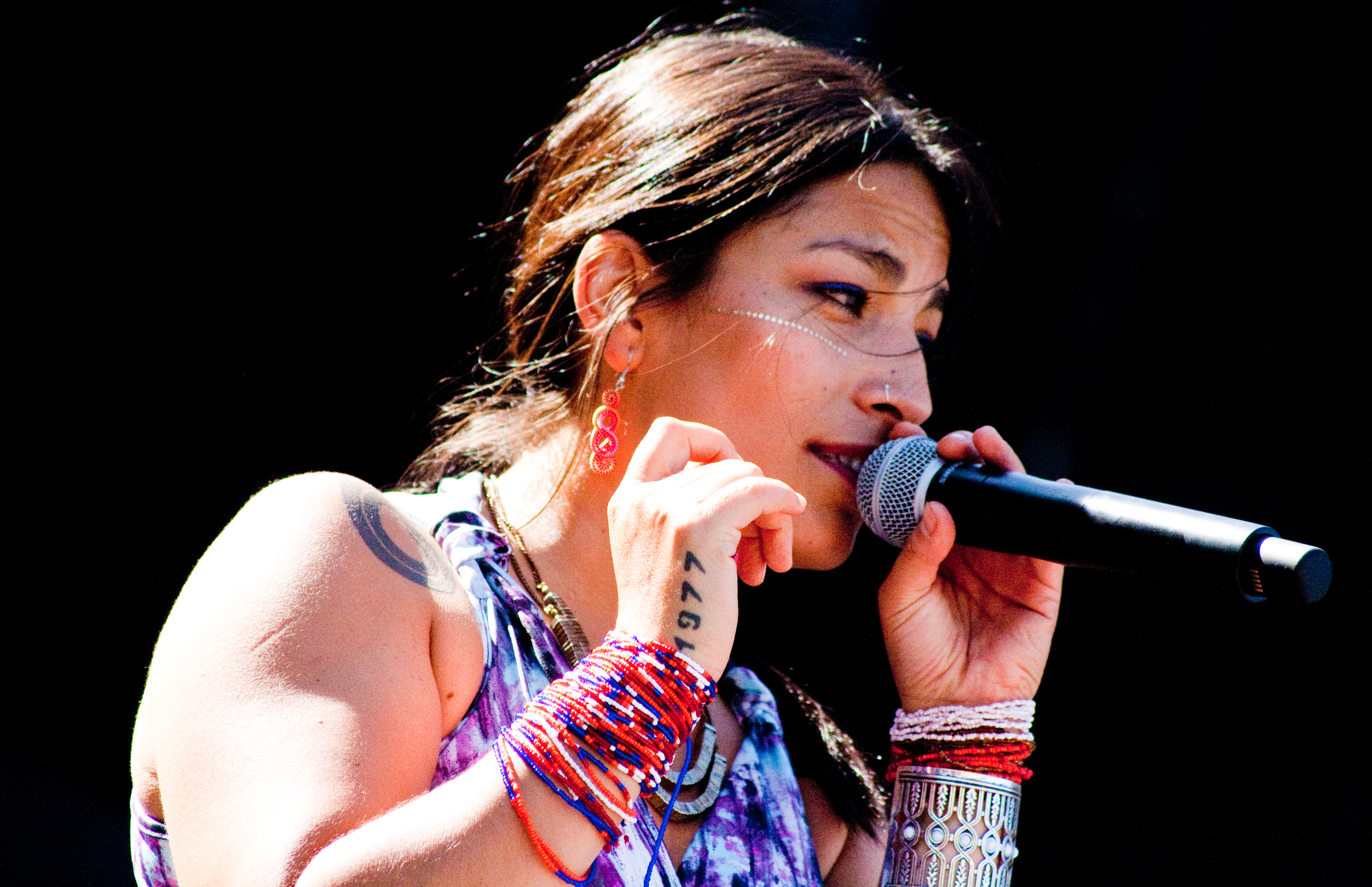 Ana Tijoux en el festival Despierta. Parque Intercomunal de la Reina.